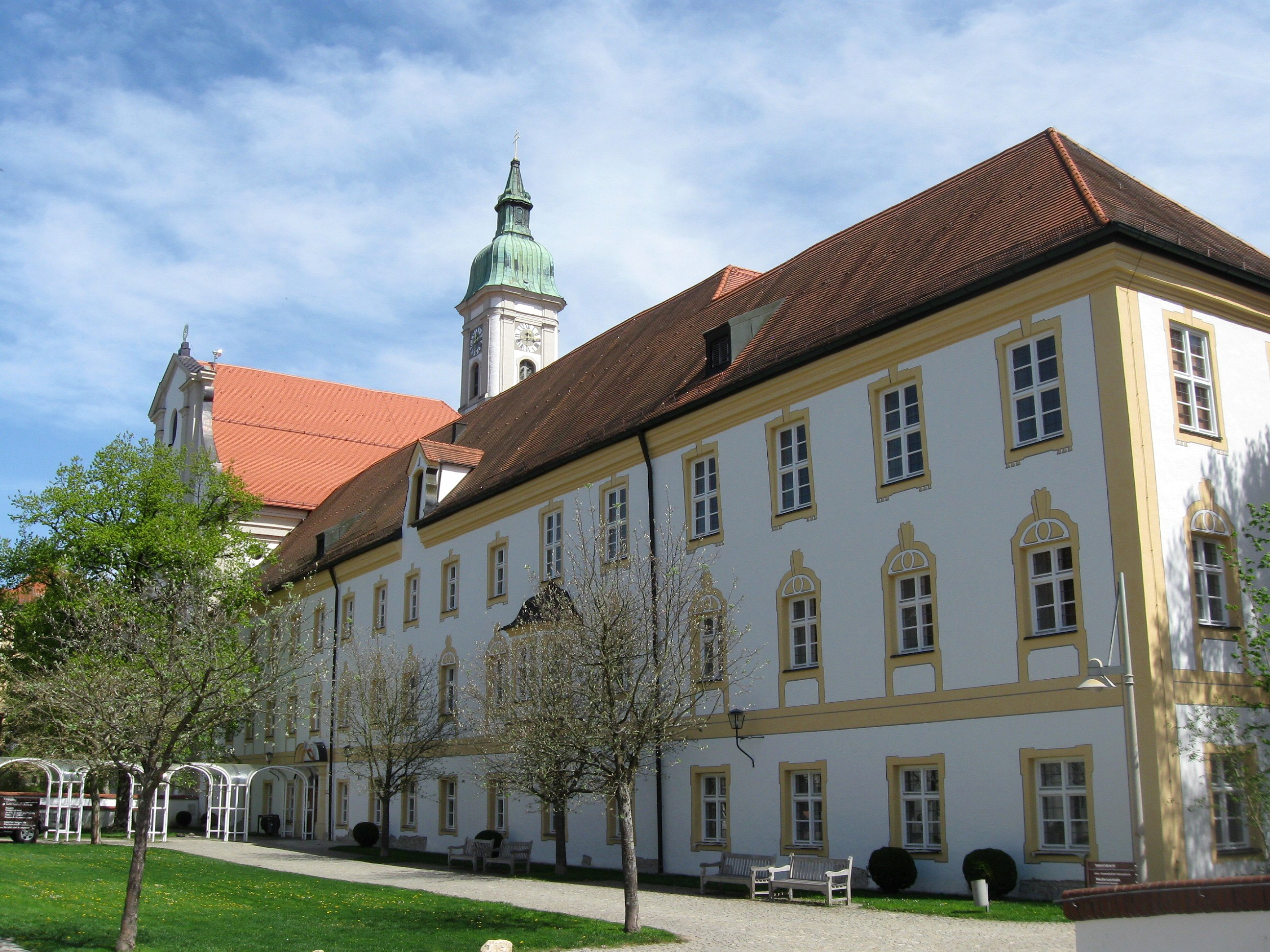 Alte Poststraße 42; Kath. Pfarrkirche St. Peter und Paul, ehem. Prämonstratenserkloster Neustift, Vierflügelanlage mit: ehem. Klosterkirche, Wandpfeilerkirche mit leicht eingezogenem Chor und seitlichem Flankenturm, von Giovanni Antonio Viscardi 1700-1715; mit Ausstattung; ehem. Klostergebäude, jetzt Landratsamt, dreigeschossiger vierflügeliger Putzbau mit Walmdach und Aufzugsgauben, 4. Viertel 17. Jh.; ehem. Klosterbibliothek, zweigeschossiger Putzbau mit steilem Satteldach und Fassadengliederung, 17. Jh.